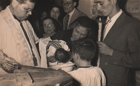 Mossén Joan celebrant un bautisme d'un nen de la família Capdevila, a l'interior de l'esglèsia del Bon Pastor